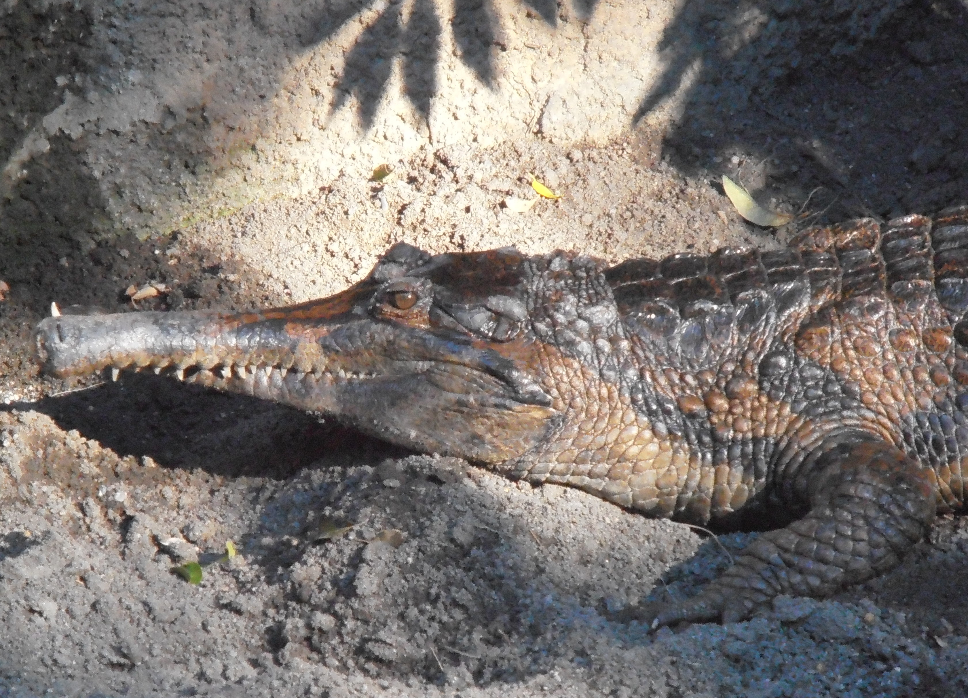 Falso gaviale (Tomistoma schlegelii) (Bioparc di Fuengirola)